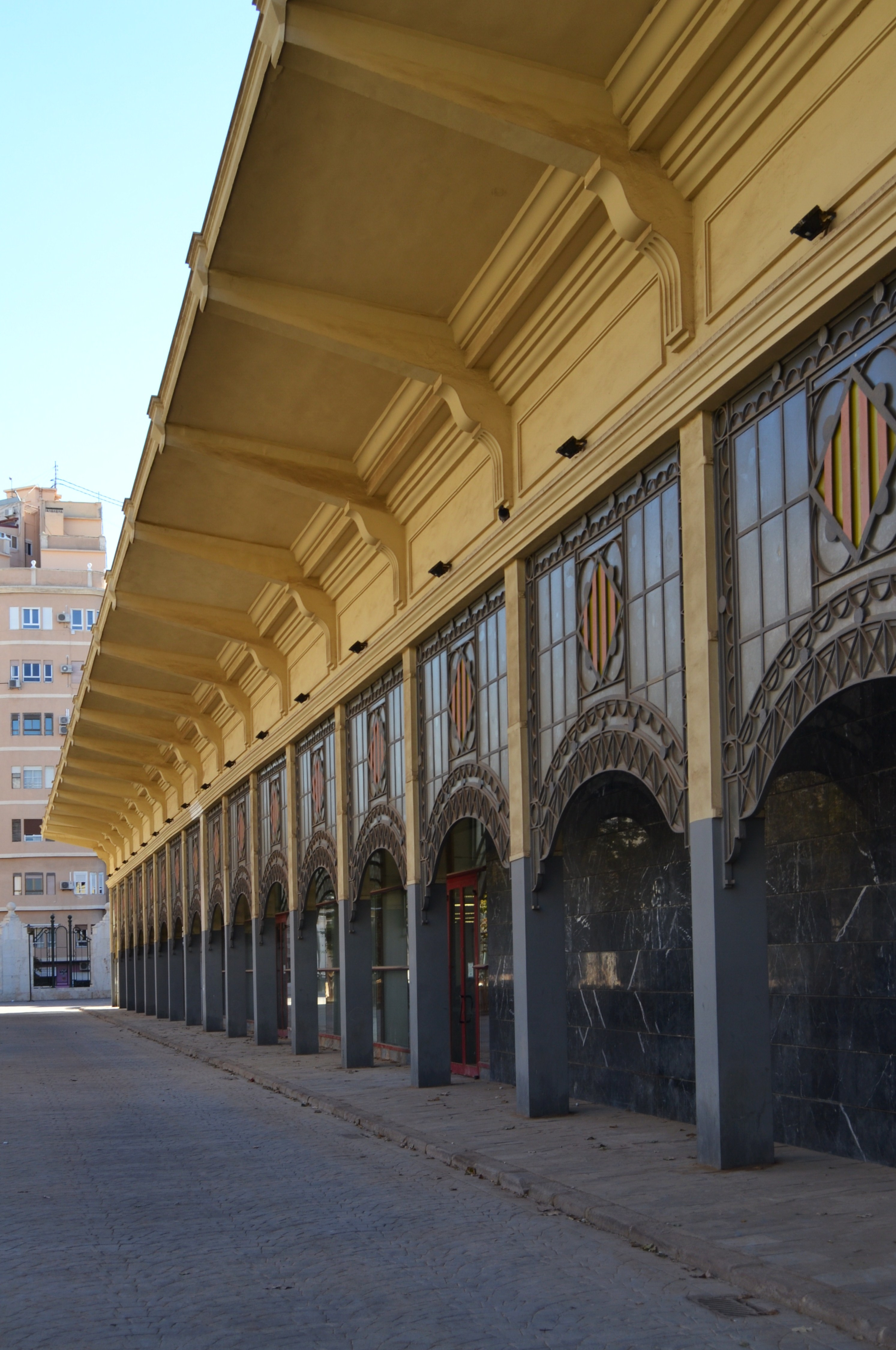 Lateral del Mercat d'Abastos de València.